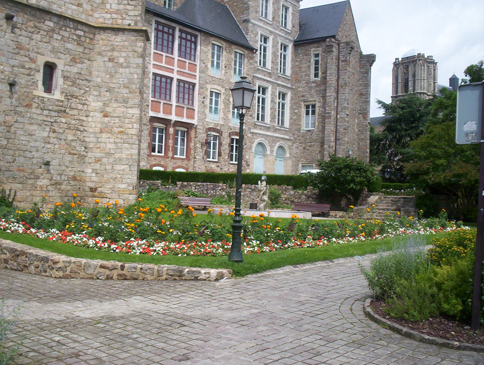 La partie nord des jardins de ronsard au Mans